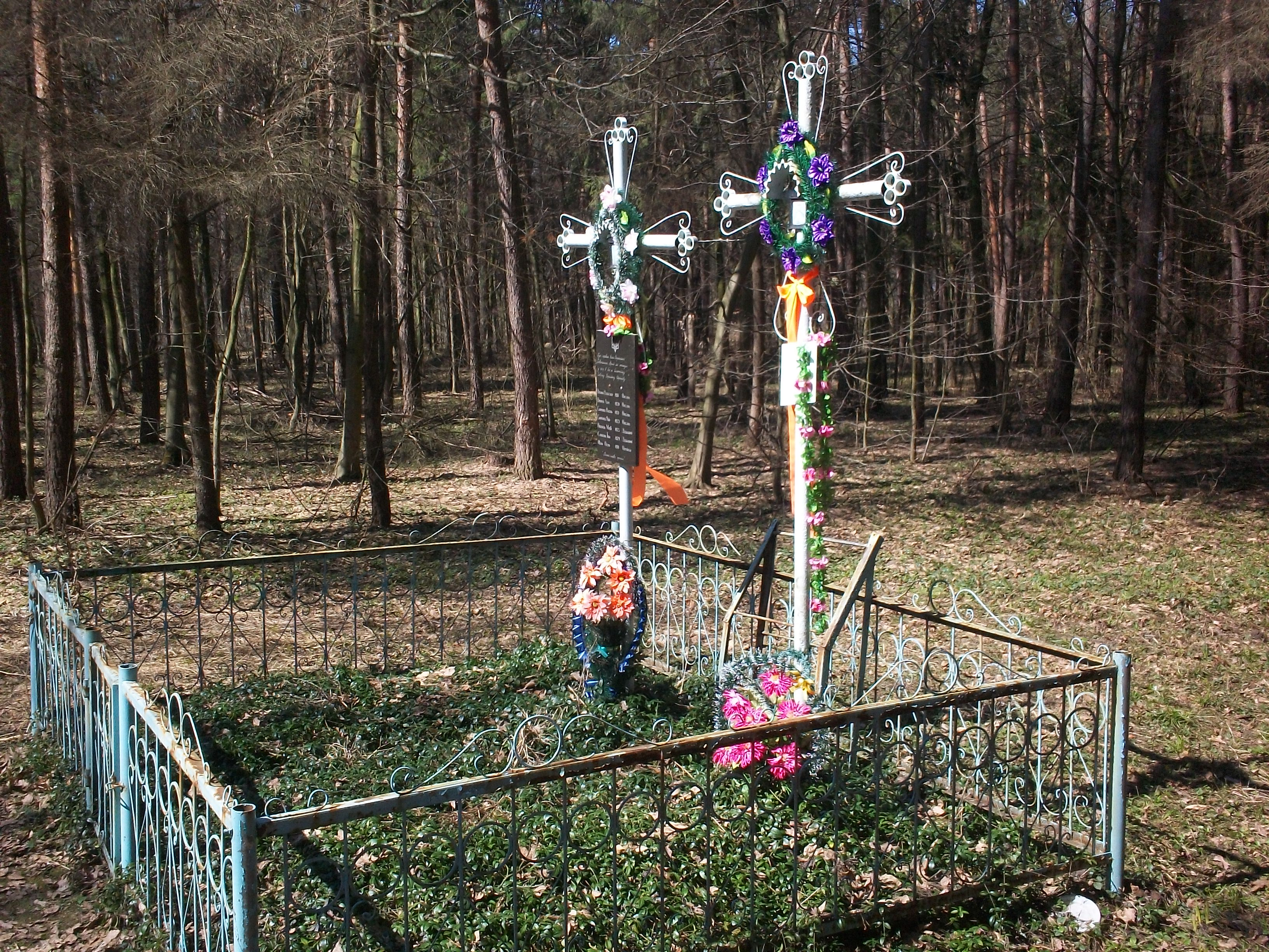 Могила воїнам УПА с.Малий Шпаків